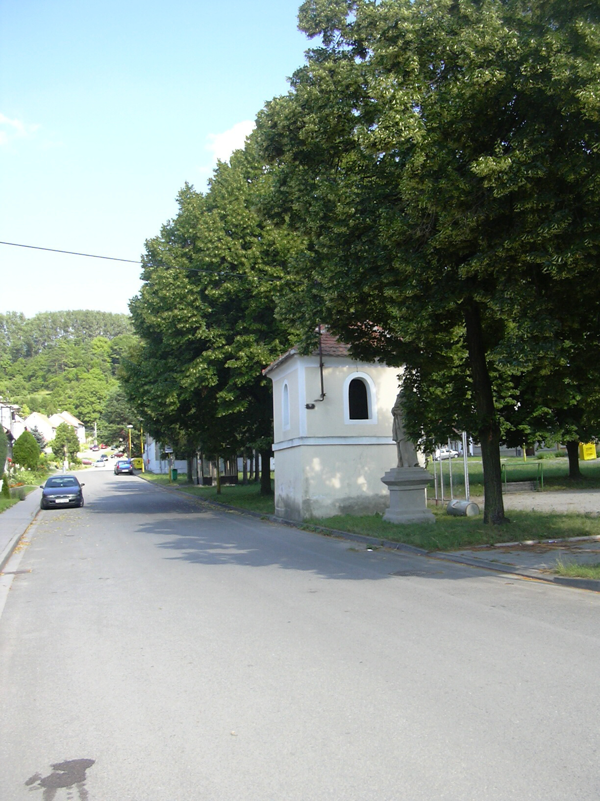 Kroužek, město Rousínov, okres Vyškov, zvonice.